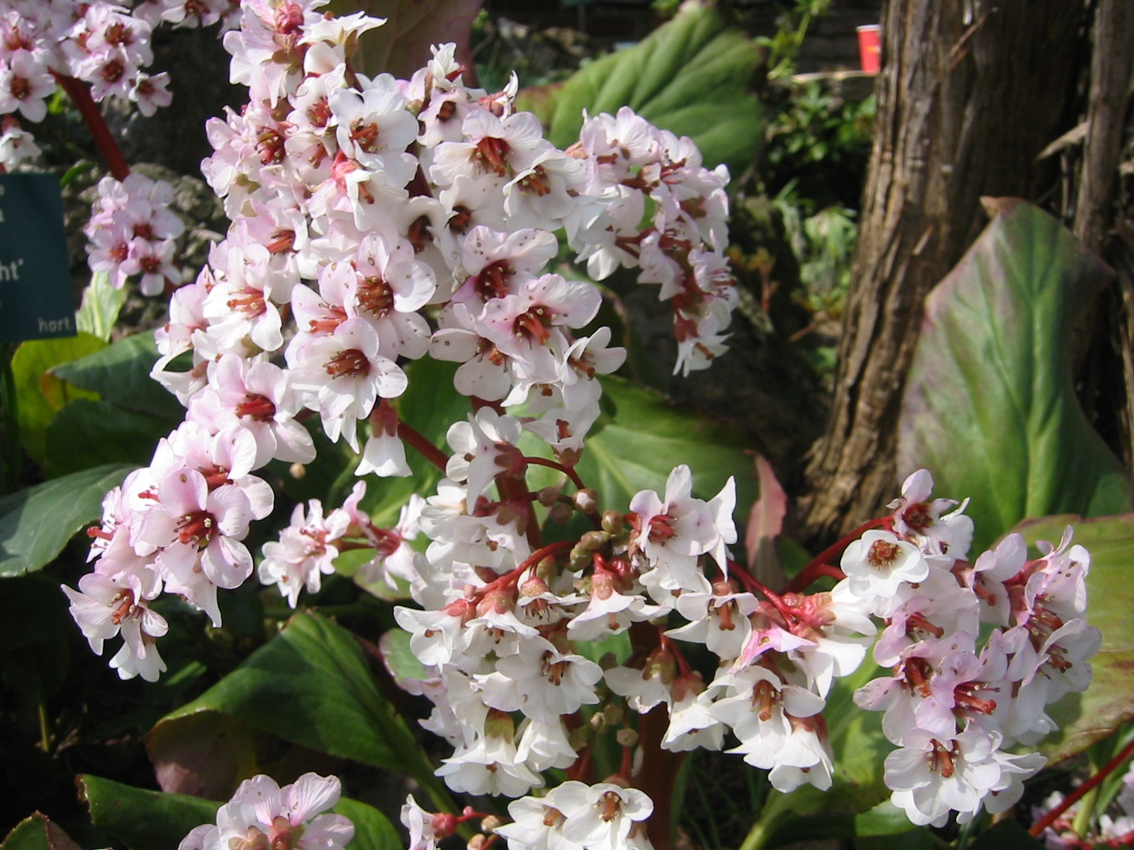 Bergenia_Hybride_Silberlicht; Botanic Garden, Vienna, Austria.